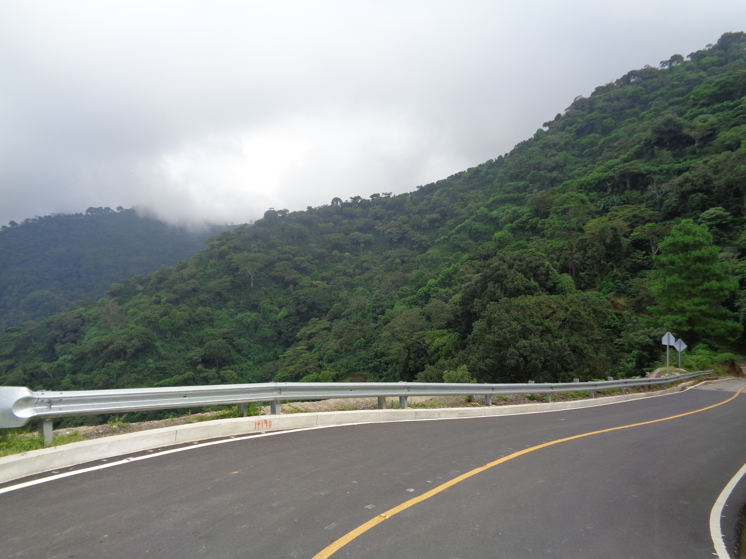 NUEVA CARRETERA CON HERMOSA VISTA COMUNIDAD LAS FLORES CHILTIUPAN LADO DE LA CUMBRE